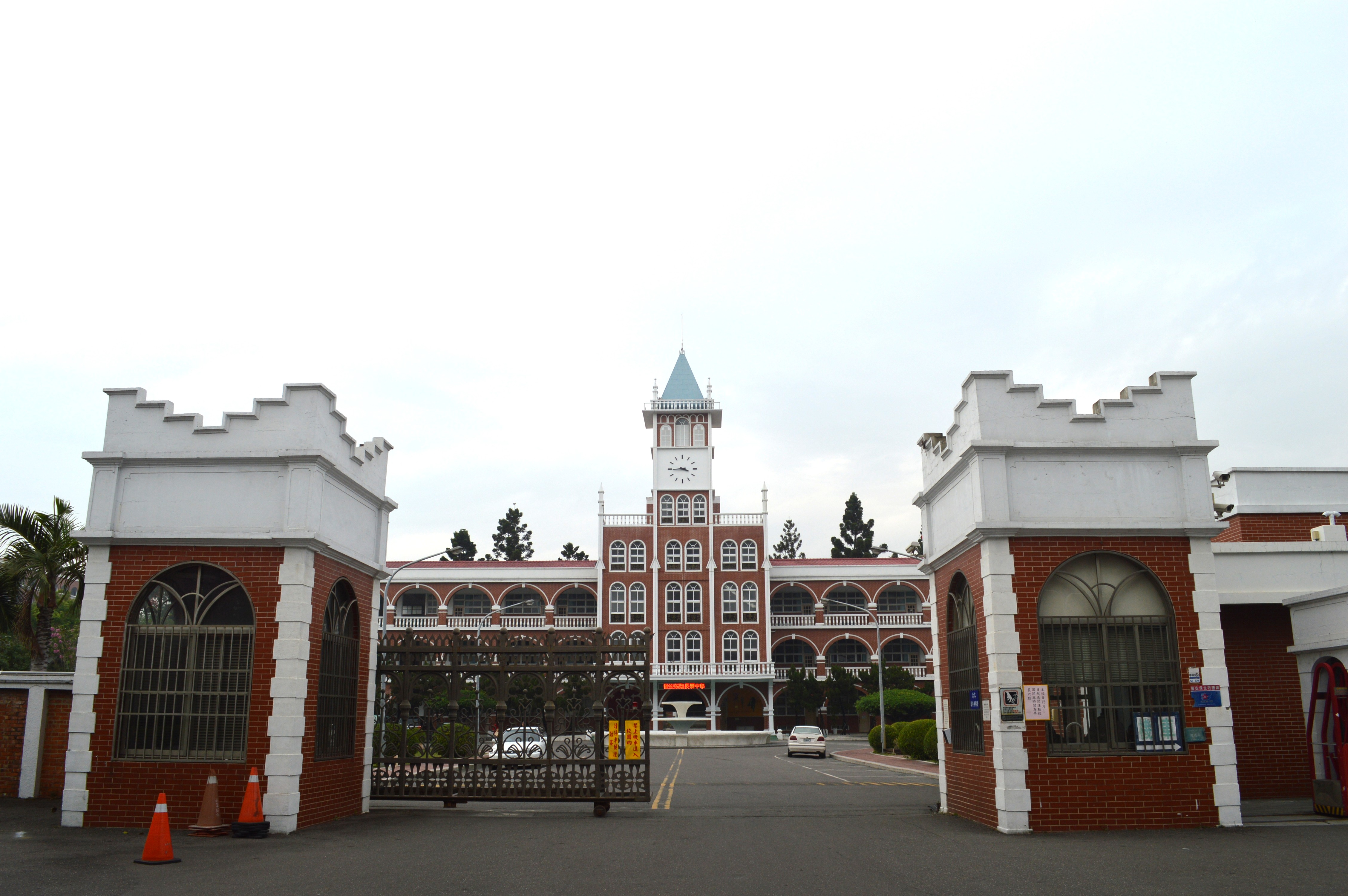 2013.12.21拍攝於長榮高級中學大門口